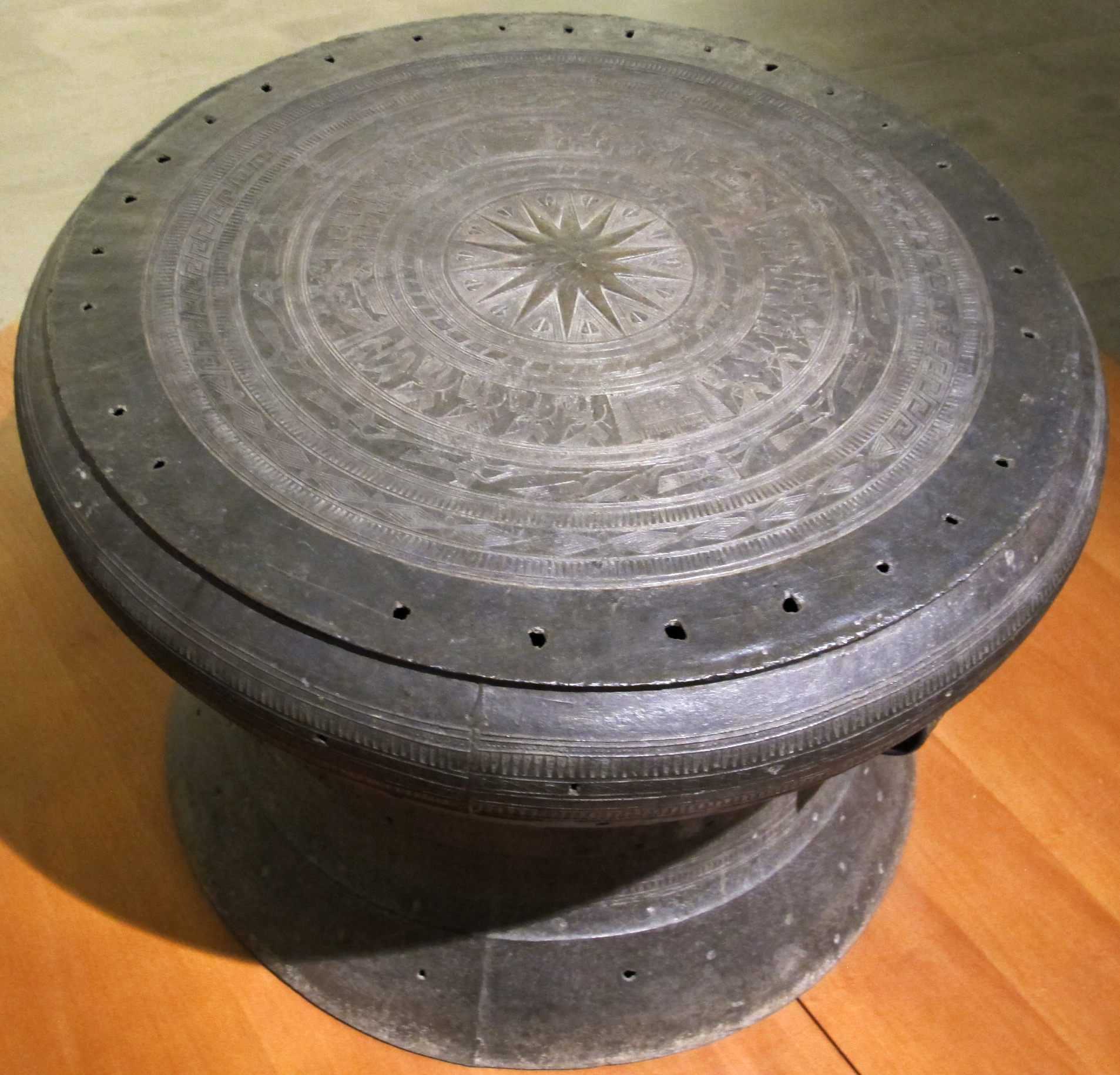 Vietnam, tamburo di song da, detto tamburo Moulié, cultura di Sông Dông Son II, I millennio ac.